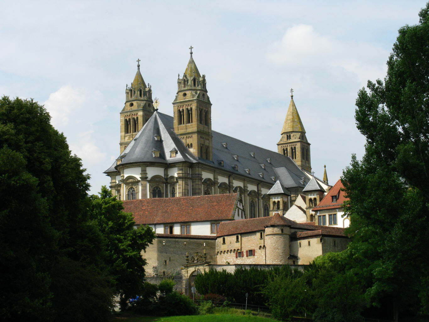 Kloster Comburg bei Schwäbisch Hall